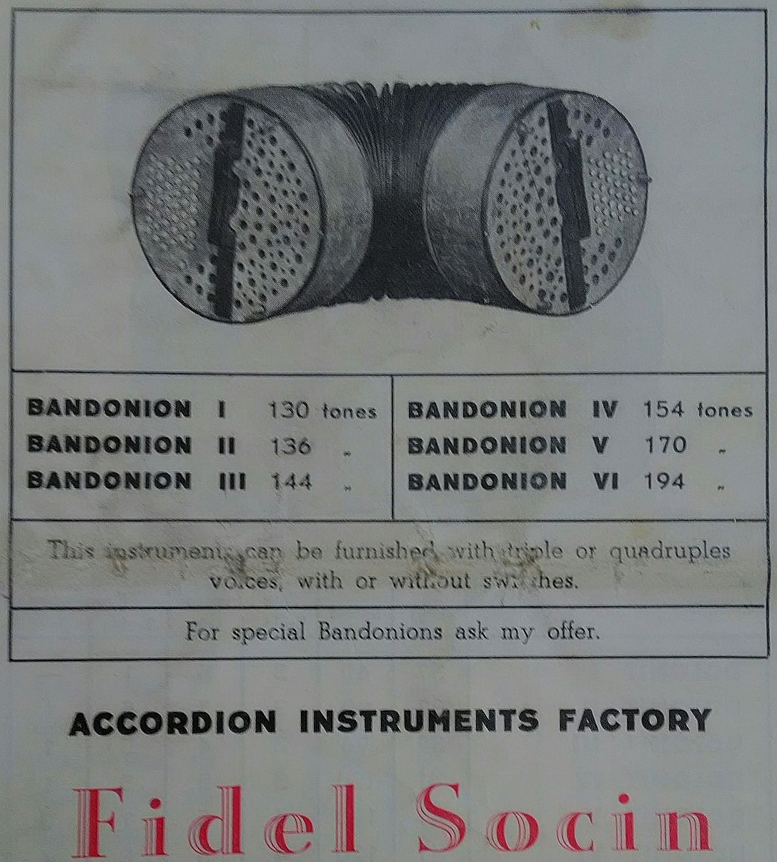 Bandoneòn Fidel Socin Bolzano- descrizione modelli di Bandoneòn.